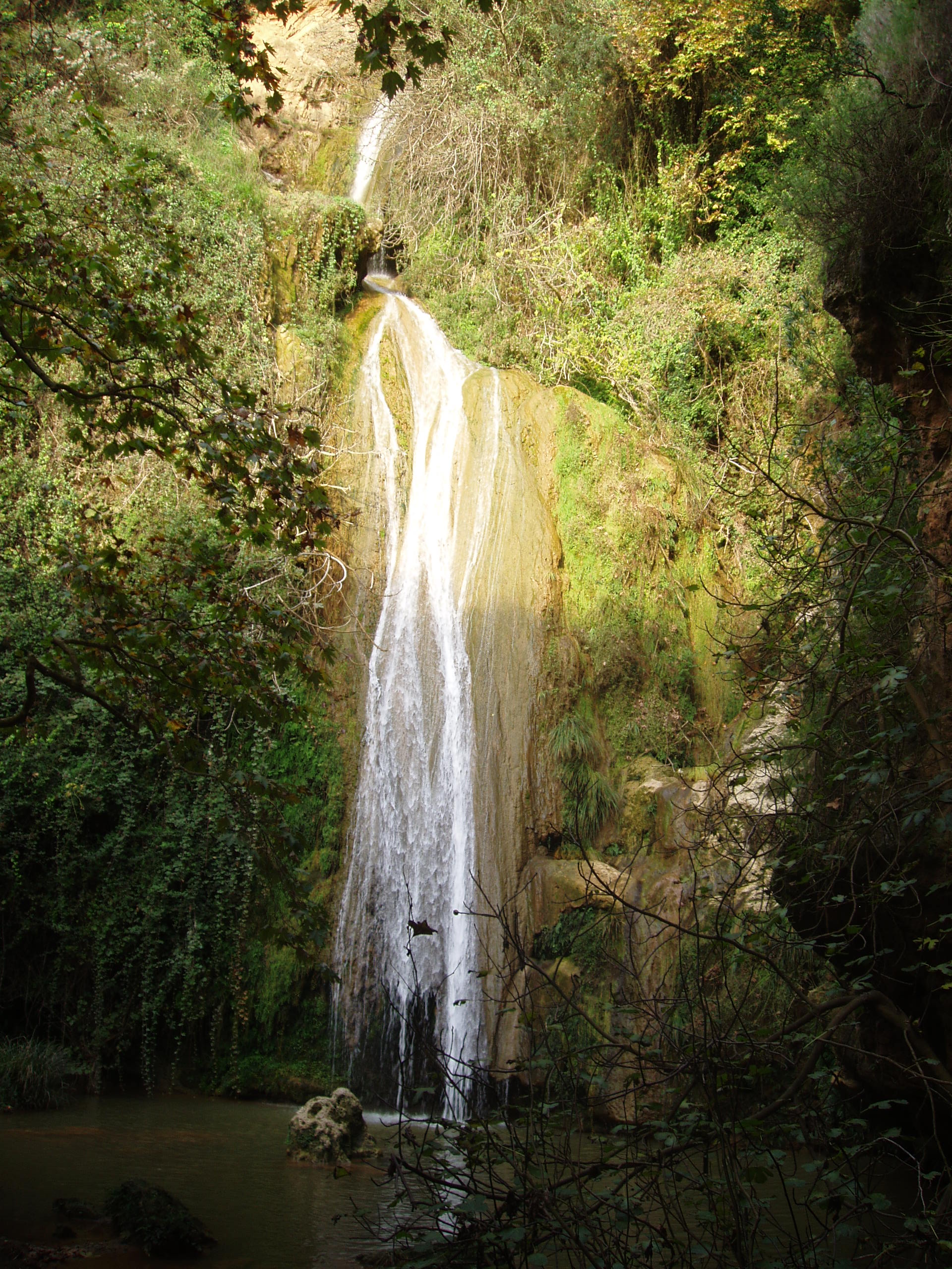 Wasserfall "Kalamari Katarakt" bei Gialova, Griechenland